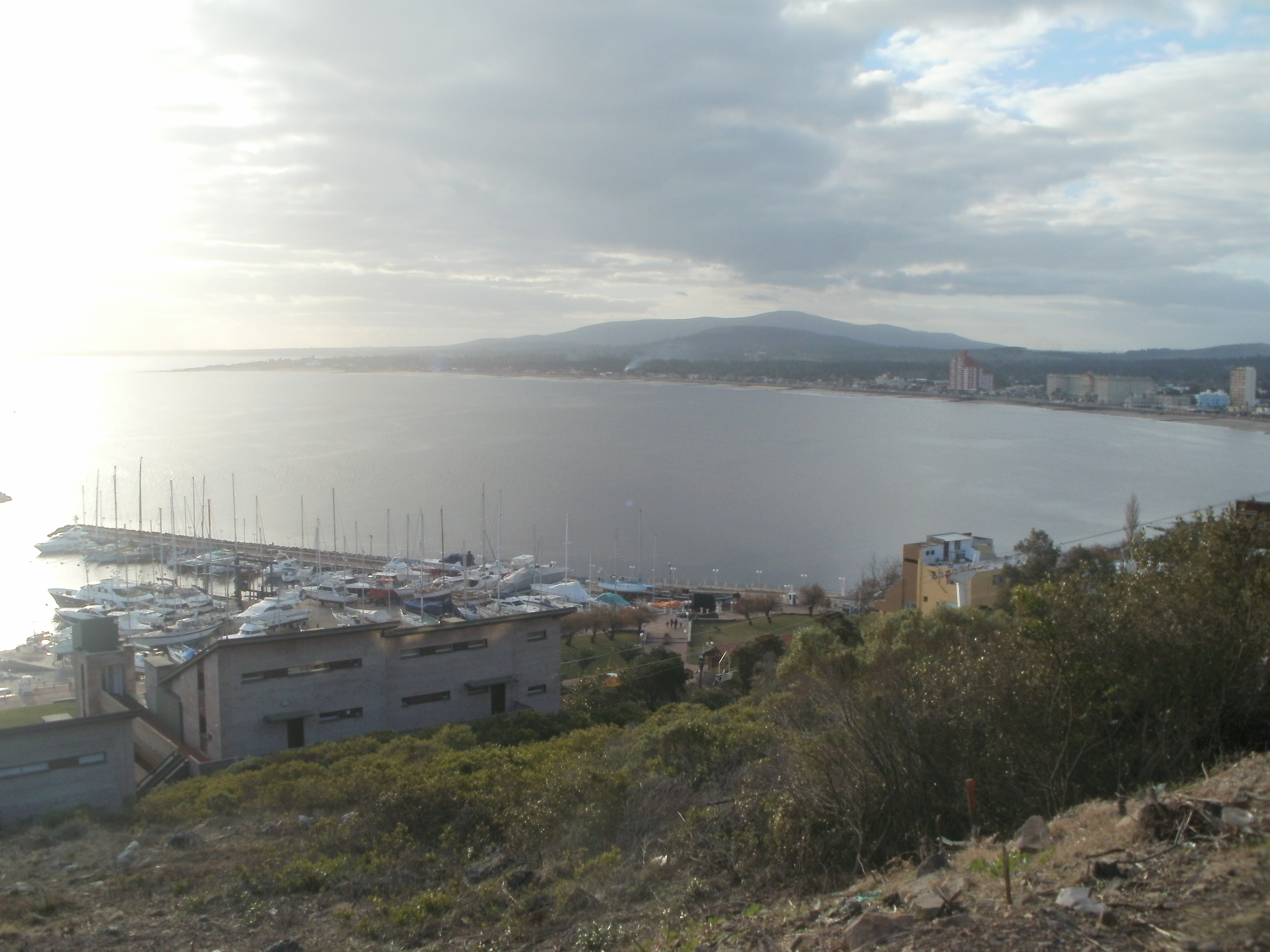 Rambla de piriapolis